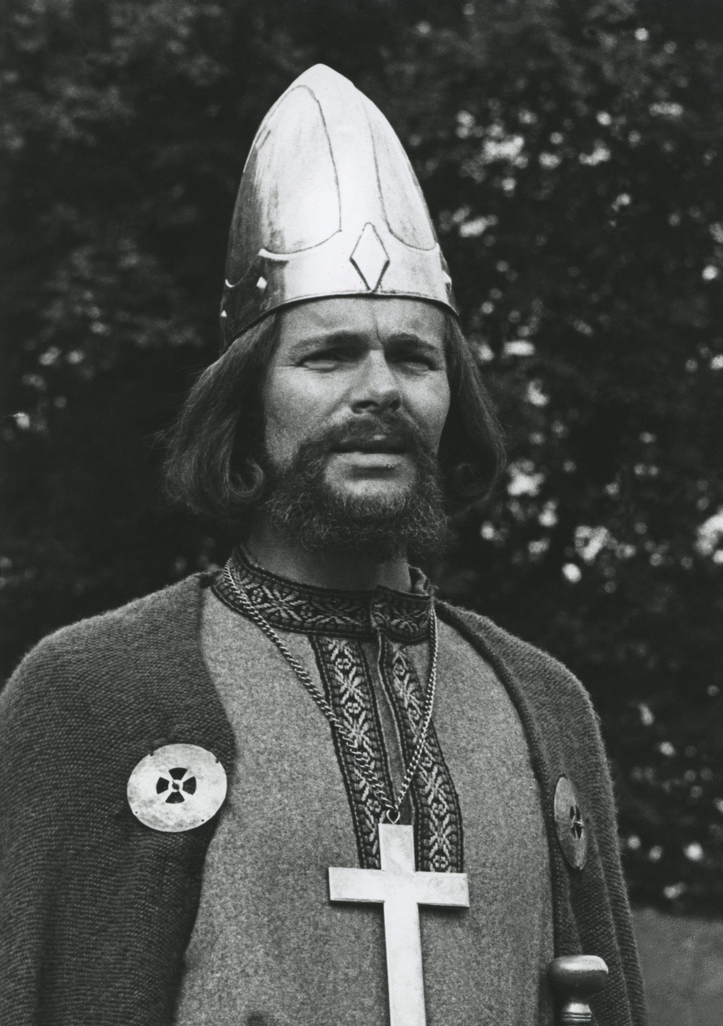 Norwegian actor Odd Furøy as king Olaf II of Norway in the The Saint Olav Drama at Stiklestad 1969.